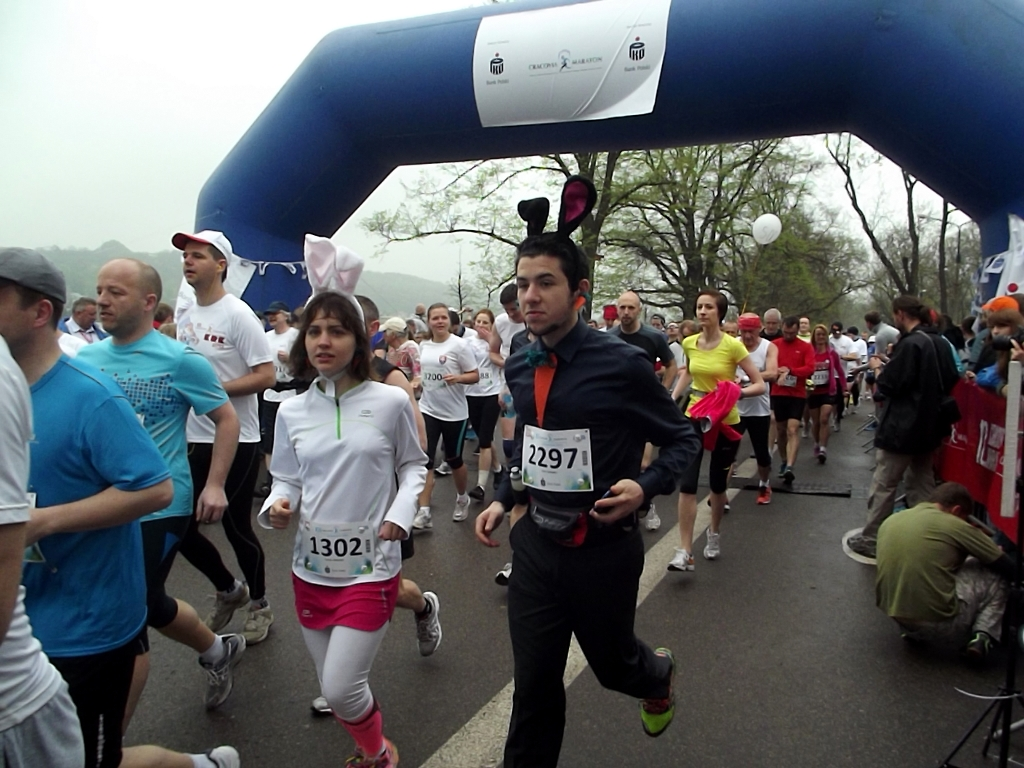 Zdjęcie zrobione podczas 12. Cracovia Maraton, na ulicach miasta Krakowa.